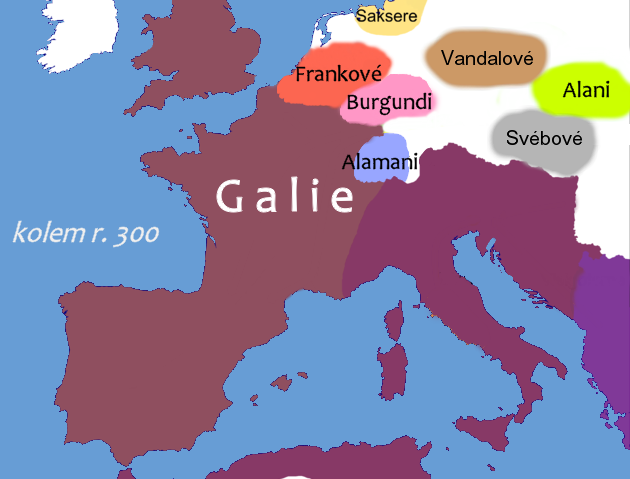 Germans and Gaul around 500AD